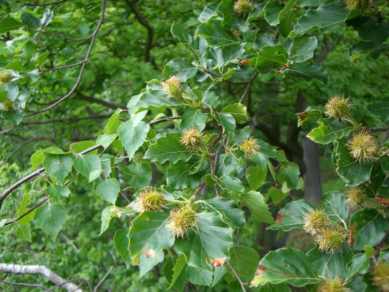 beech / Fruchtansatz an Buche